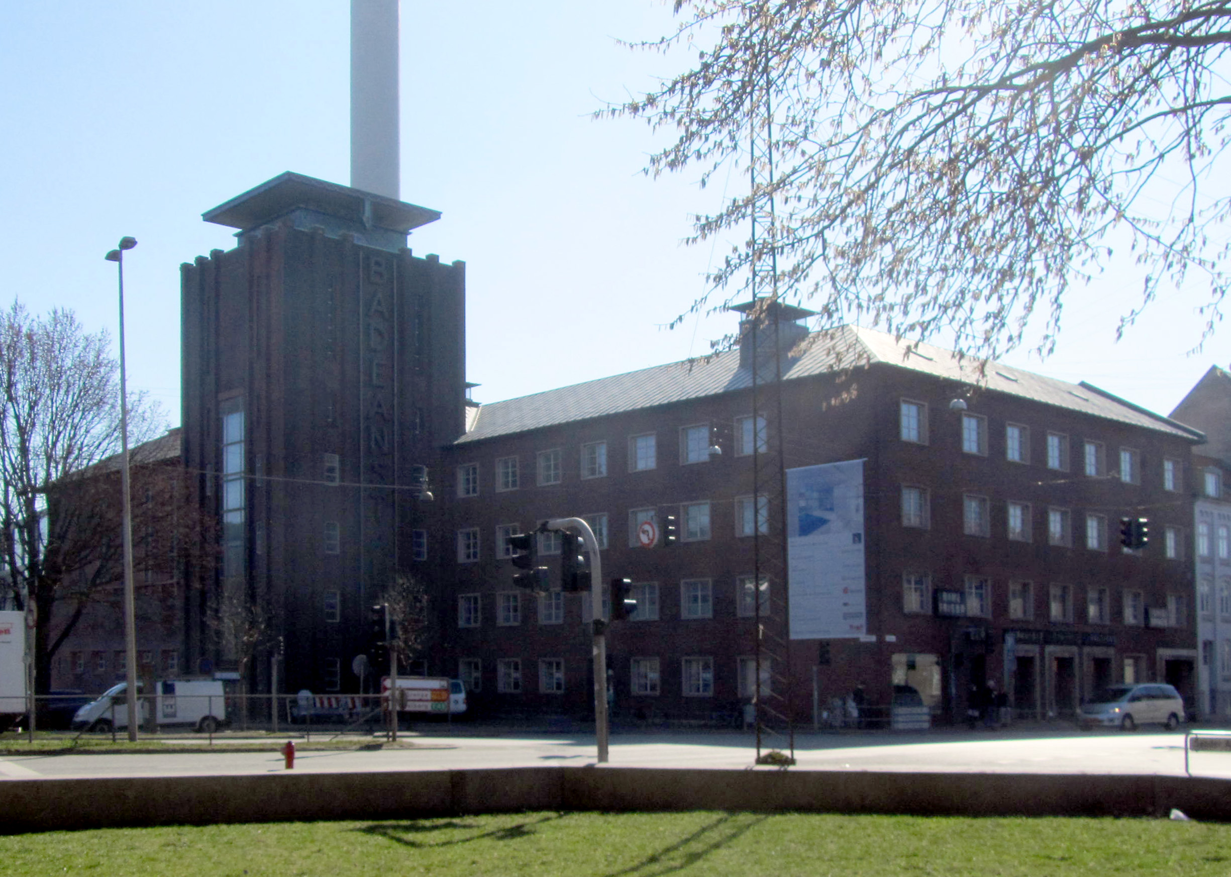 Badeanstalten Spanien i Aarhus set fra nordvest